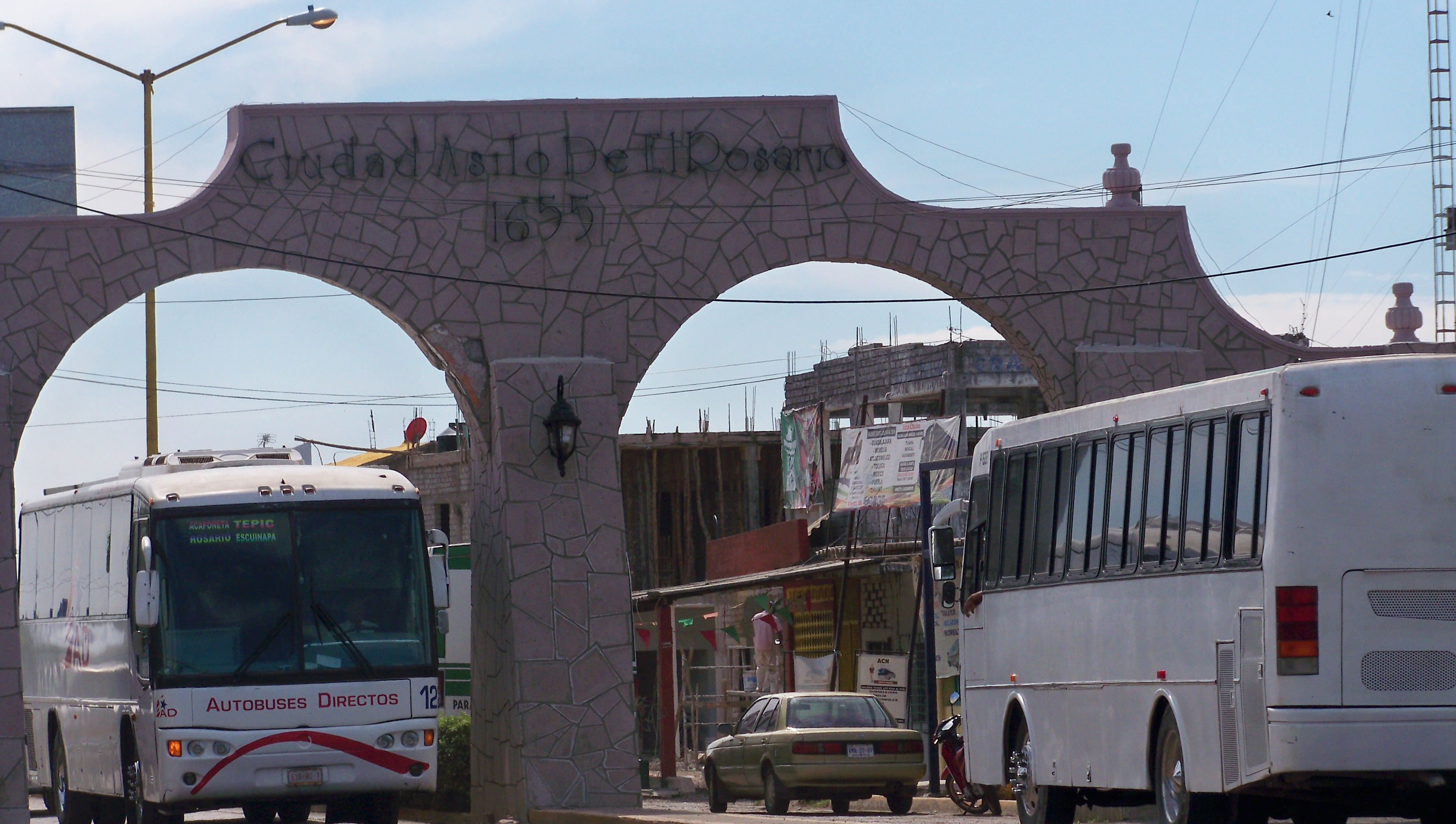 Presidentes, El Rosario, Sin., Mexico